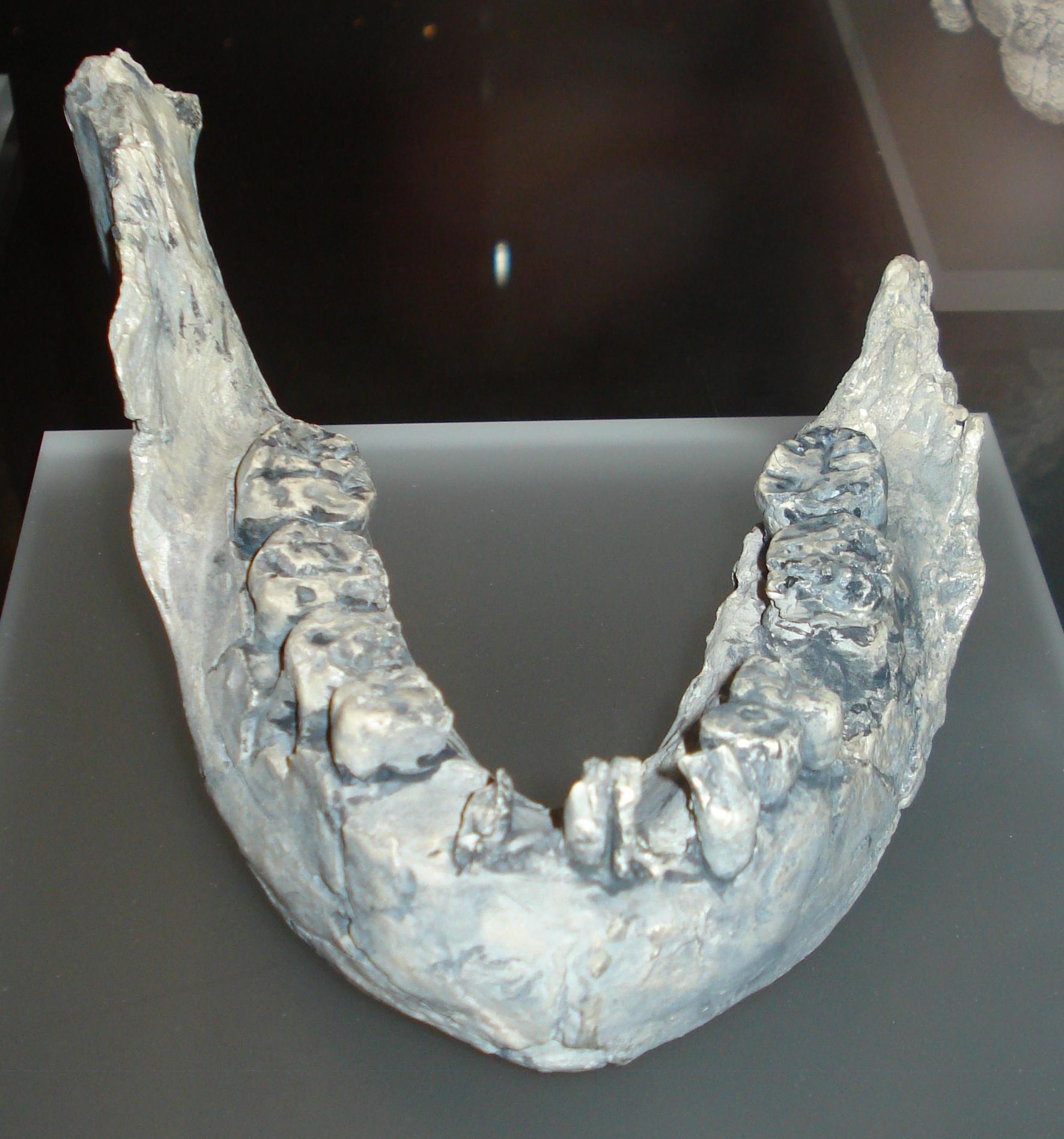 KNM-ER 729.replica (Paranthropus boisei) en el Museo de Ciencias Naturales de Madrid.